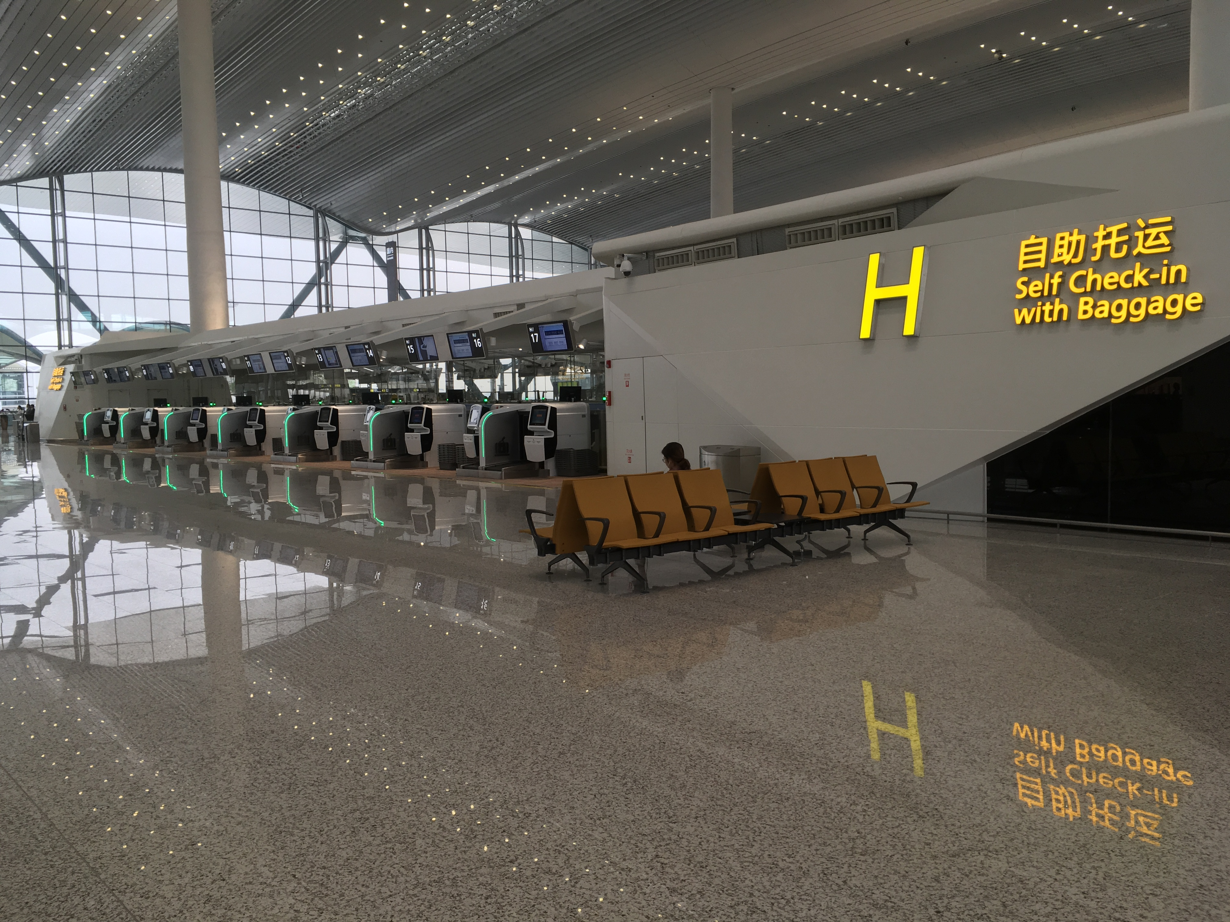 广州白云国际机场二号航站楼自助托运柜台